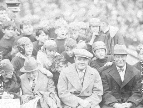 Informal group portrait of baseball players Lou Gehrig (front row, far right) and Babe Ruth (front row, second from right) sitting outdoors in Chicago, Illinois, surrounded by a group of boy football players and adults